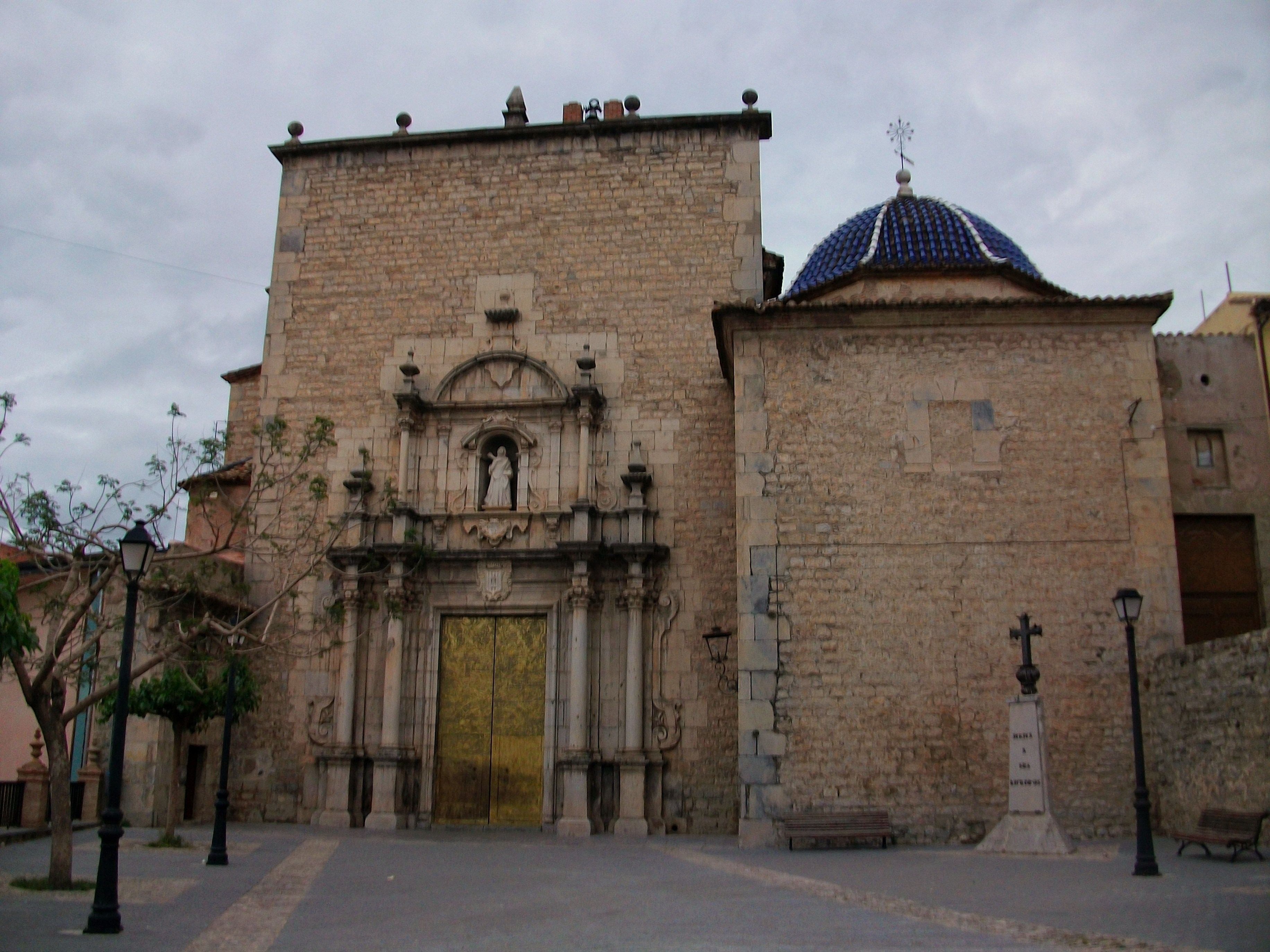 Església de Santa Àgueda de Xèrica (l'Alt Palància, País Valencià).